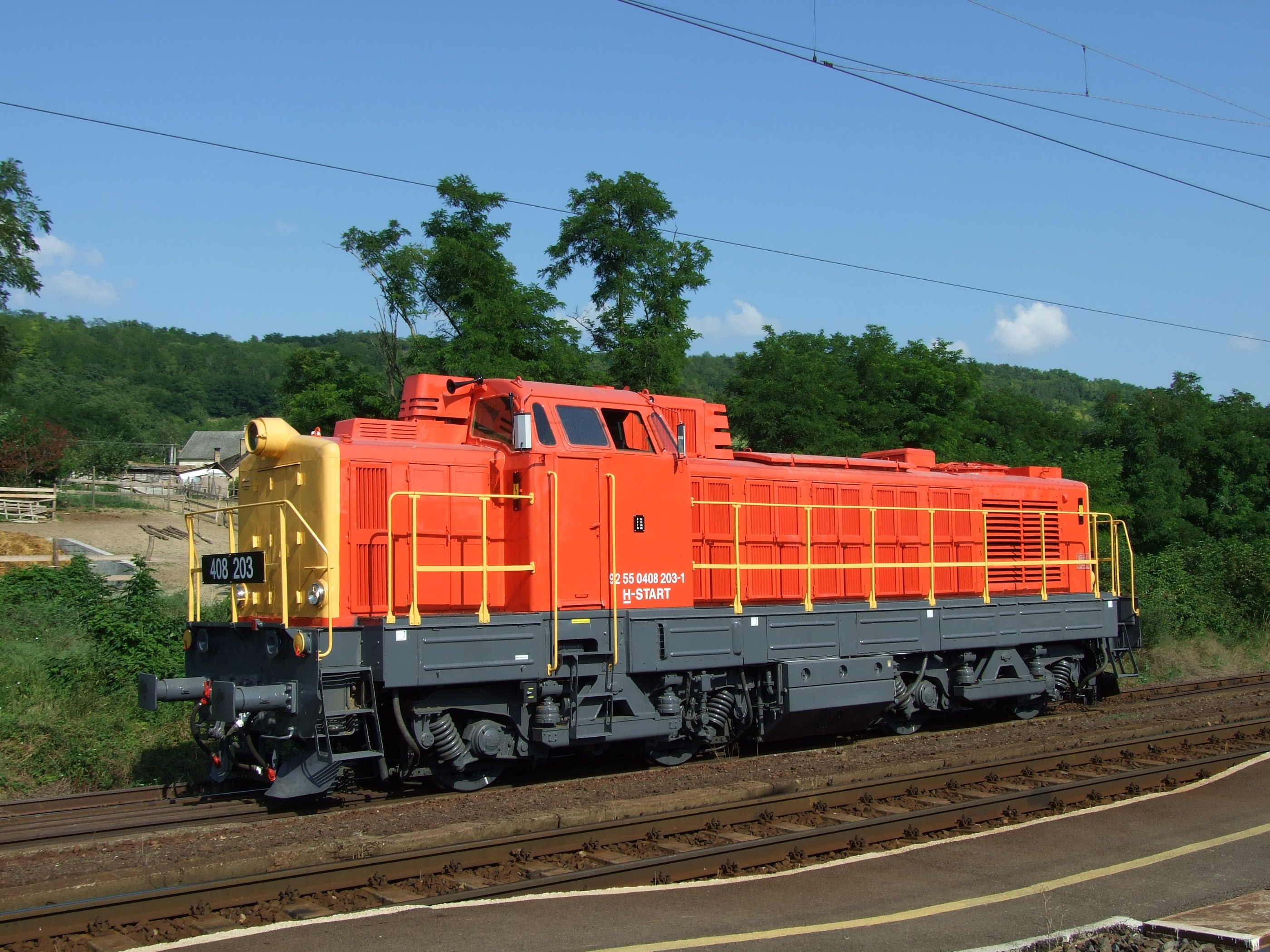 M40 sorozatú mozdony nem sokkal a felújítás után (Kurd, Tolna megye, Magyarország)